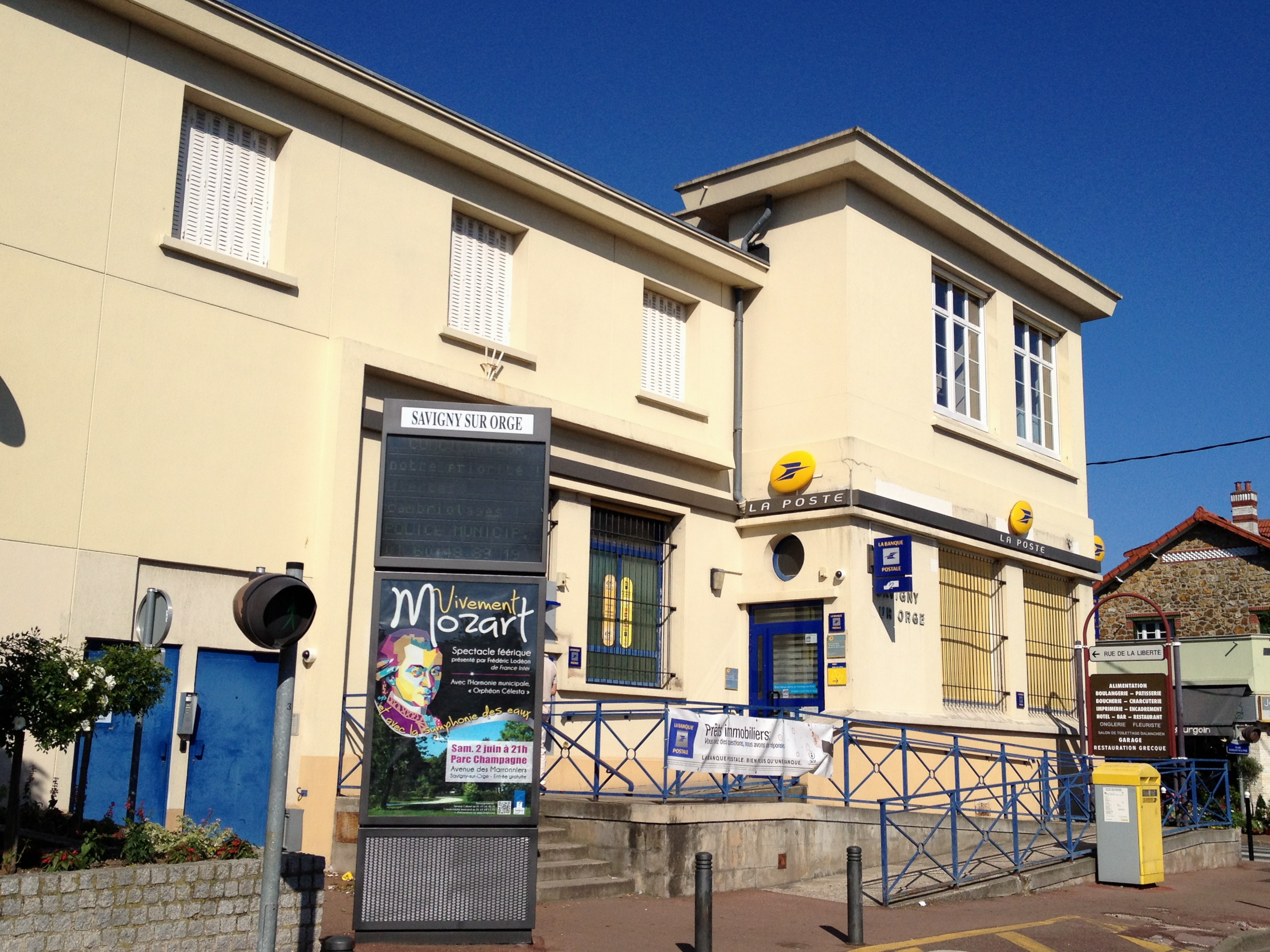 La poste centrale de Savigny-sur-Orge (91)